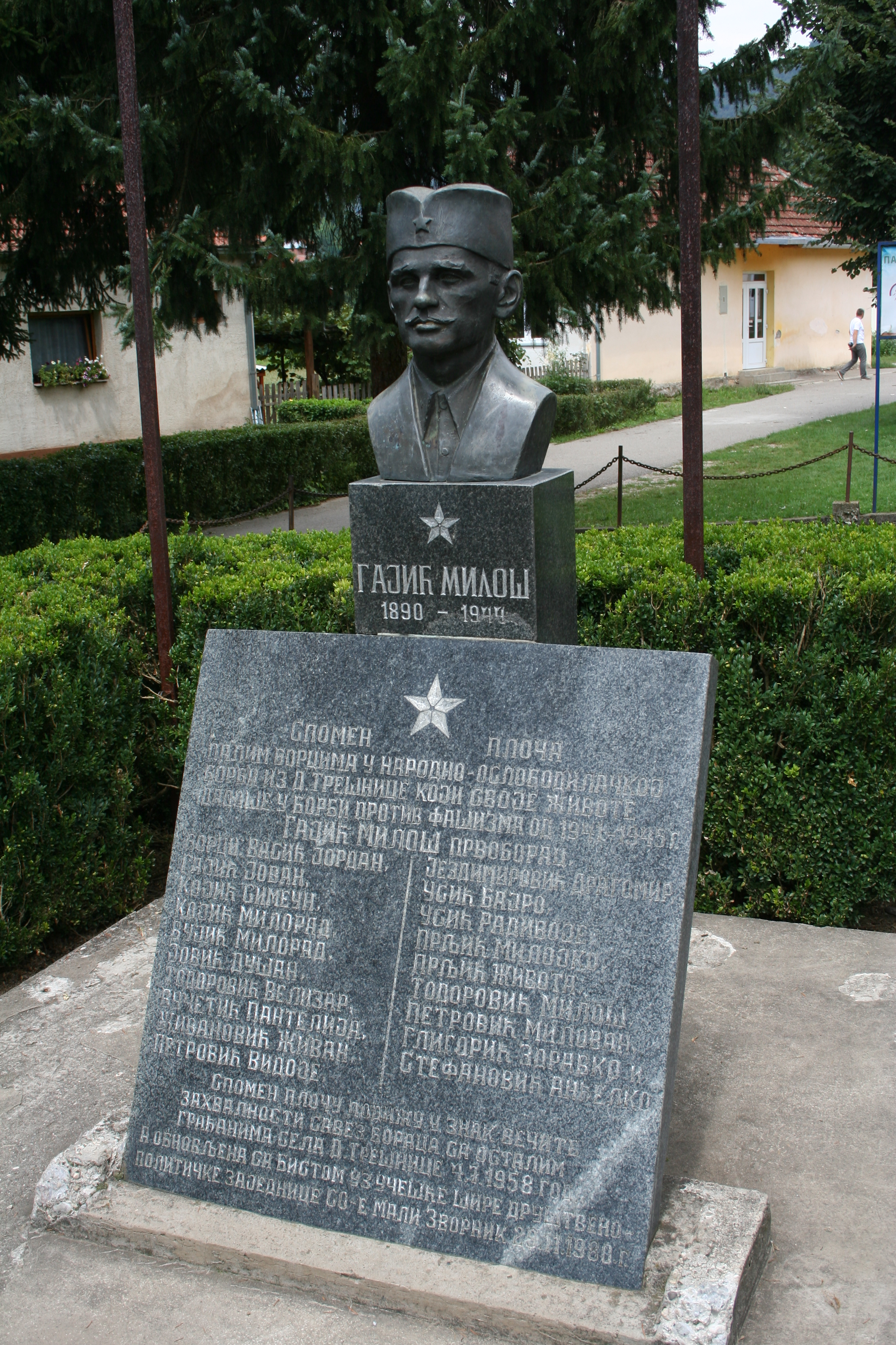 Seoska škola, Donja Trešnjica